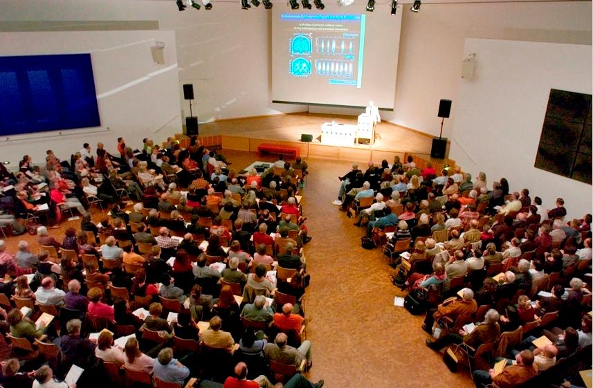 Symposium 2007